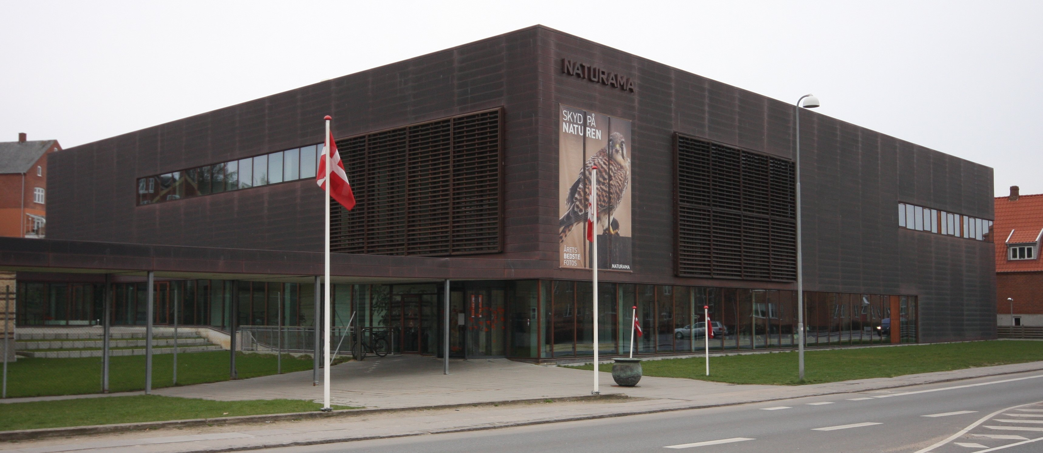 Naturama, natural history museum in Svendborg, Denmark.